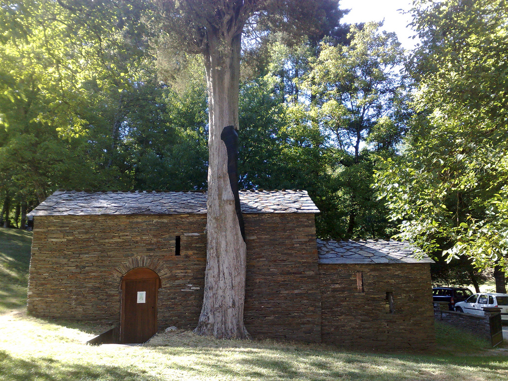 Chapelle de la fin du IXème ou début du X ème siècle, "Capela do Ciprés" à côté du monastère de Samos en Galice (Espagne) .